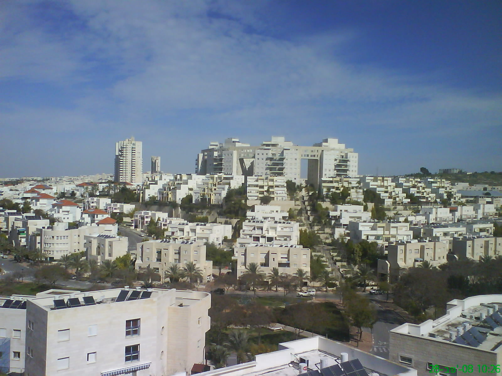 Modiin's view